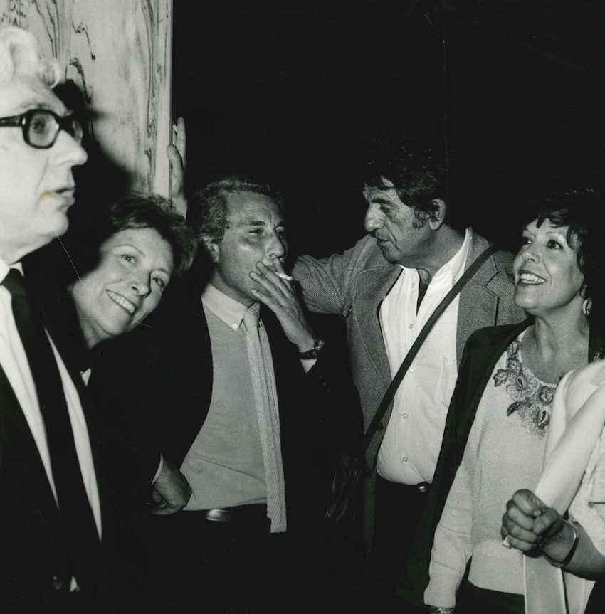 casa Silori a Roma, viale Gorizia. Da sinistra si riconoscono: Luigi Silori, Daisy Silori, Pino Caruso, Nanni Loy, Marilida Ferzetti (moglie di Pino Caruso)